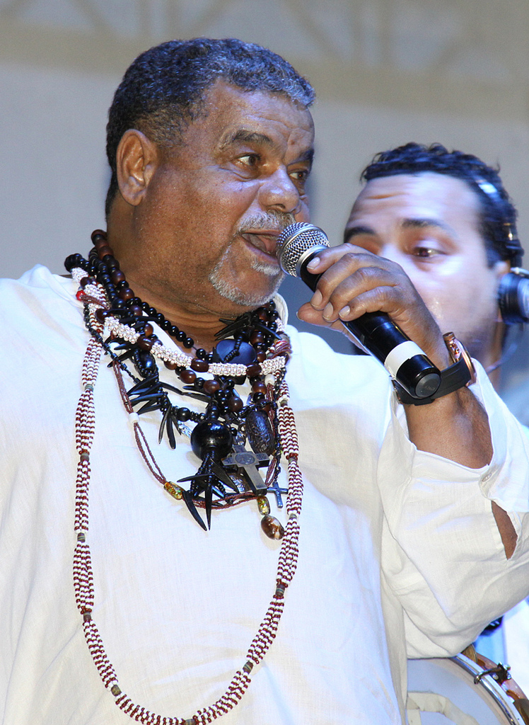 Ensaio de quadra da Beija-Flor. Foto: Ricardo Almeida.